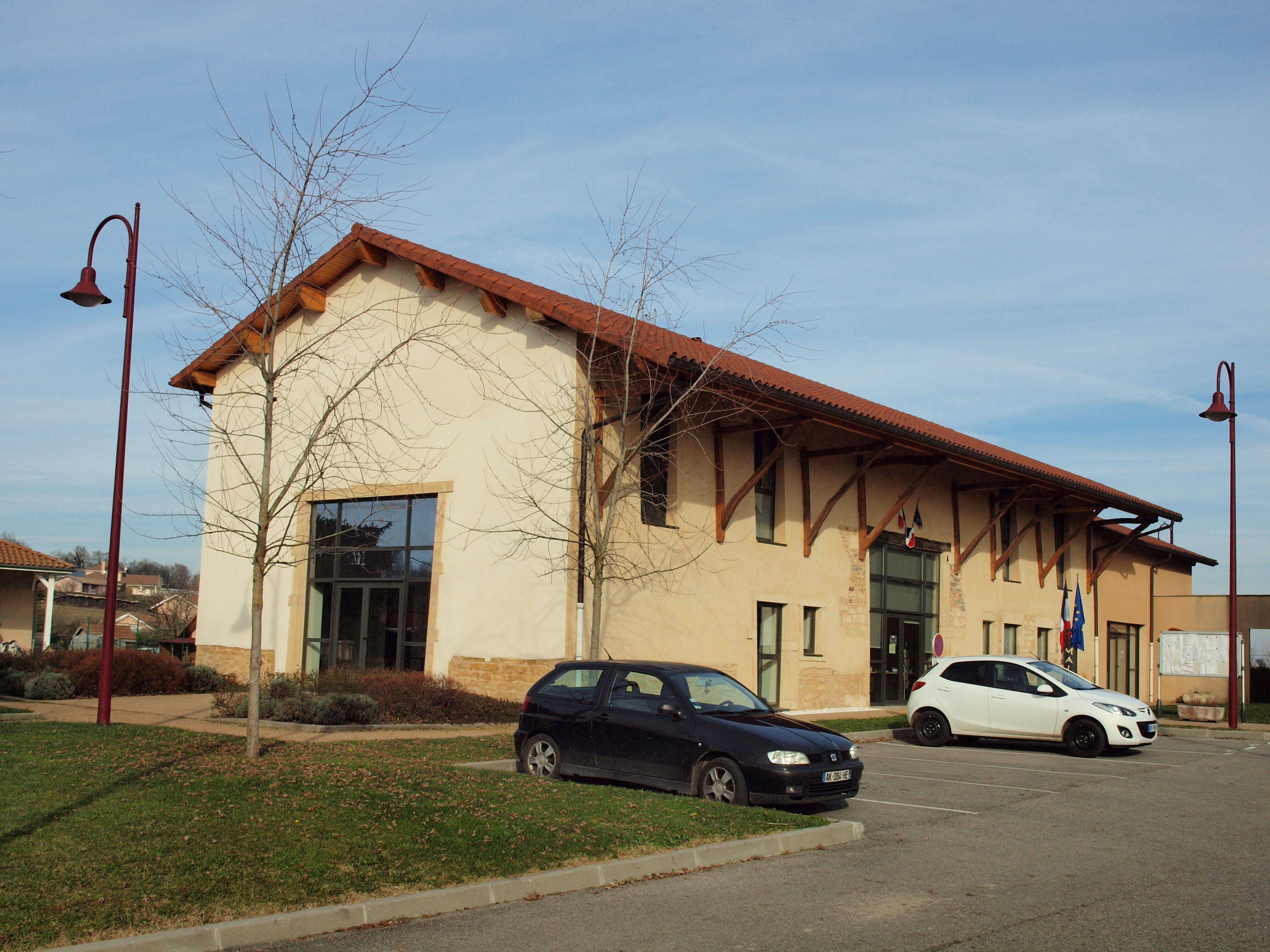 Chèzeneuve (Isère, France)